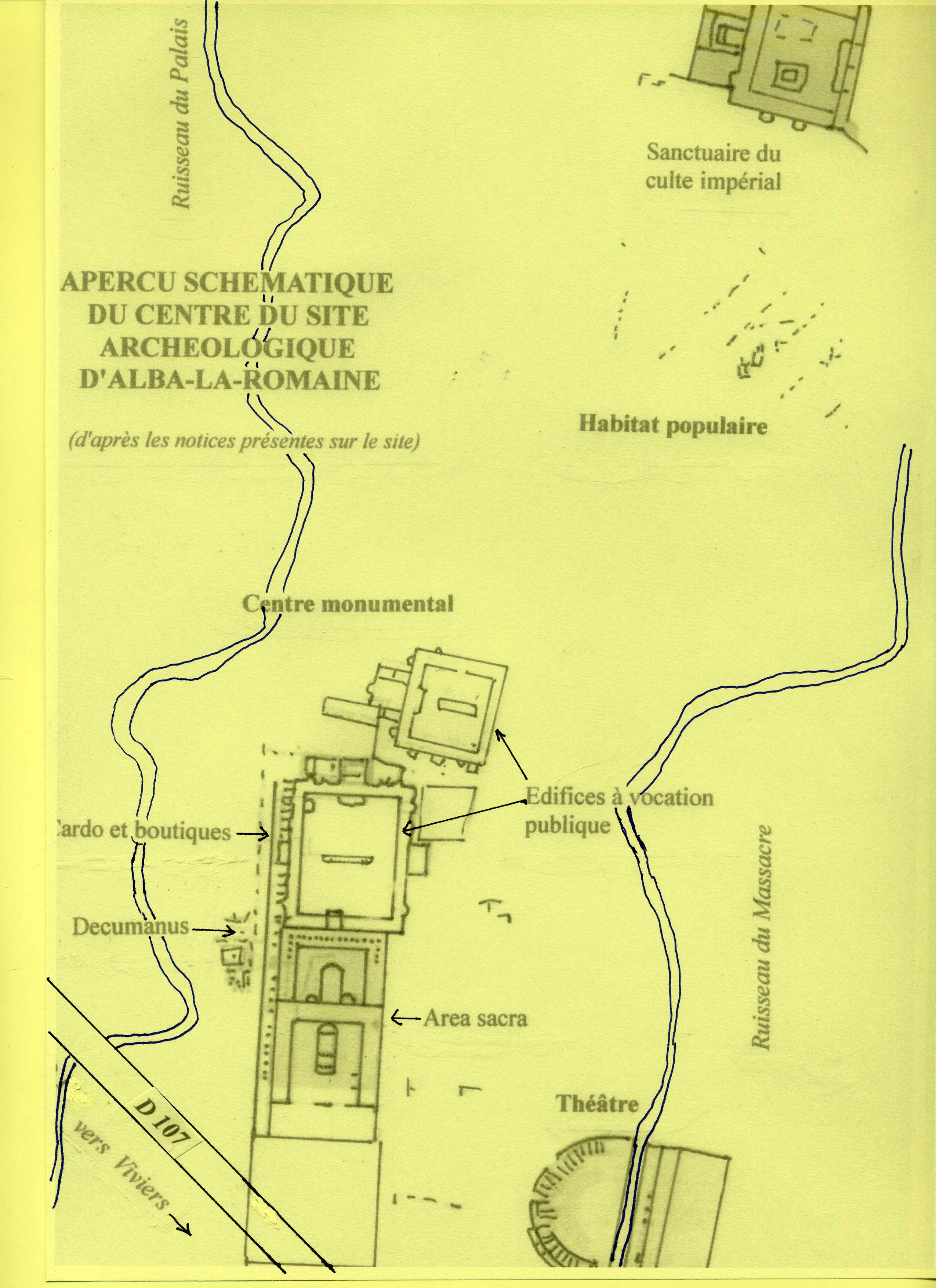 Carte du centre du site archéologique romain d'Alba-la-Romaine, Ardèche, France